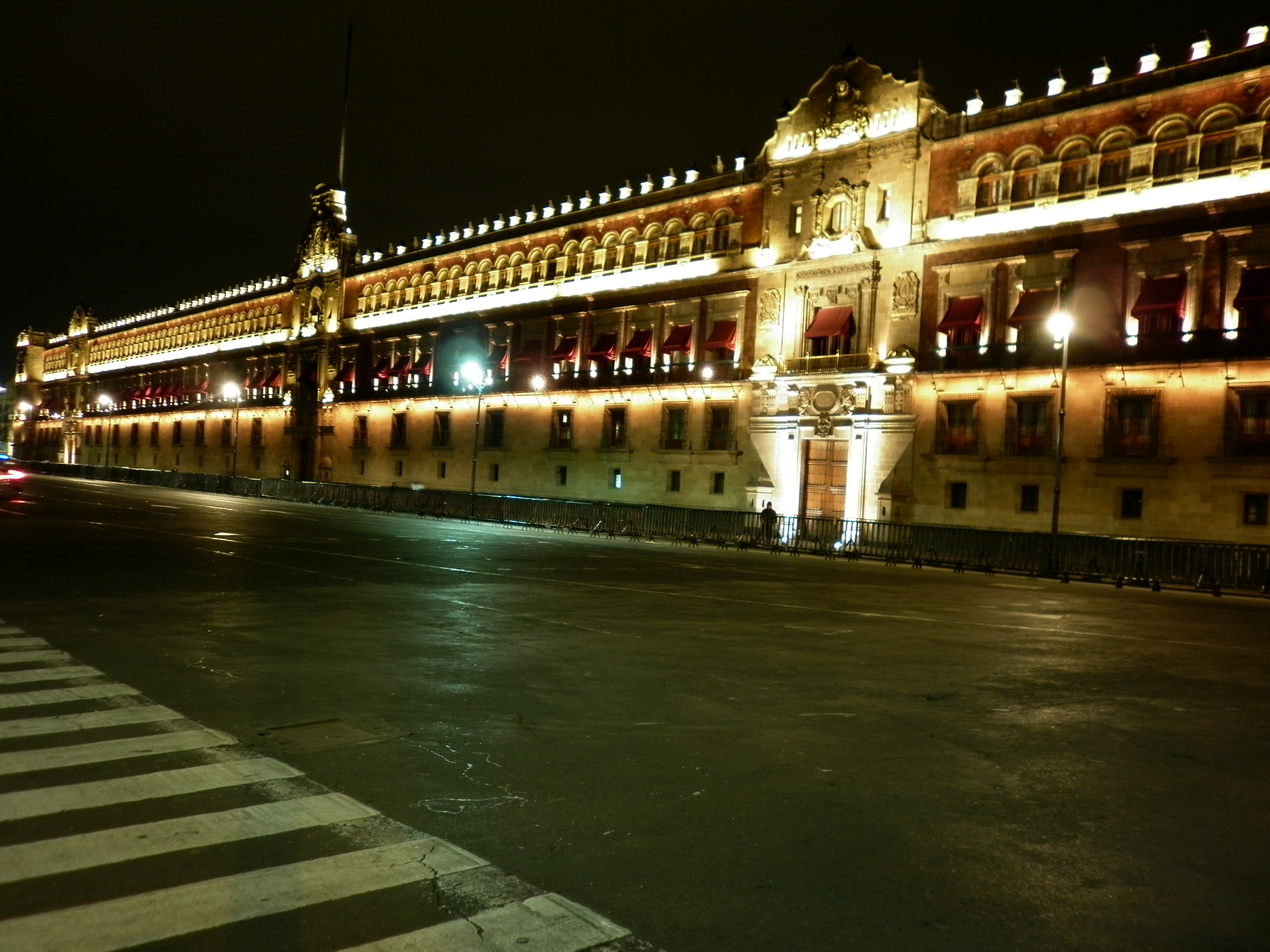 Palacio Nacional Iluminado